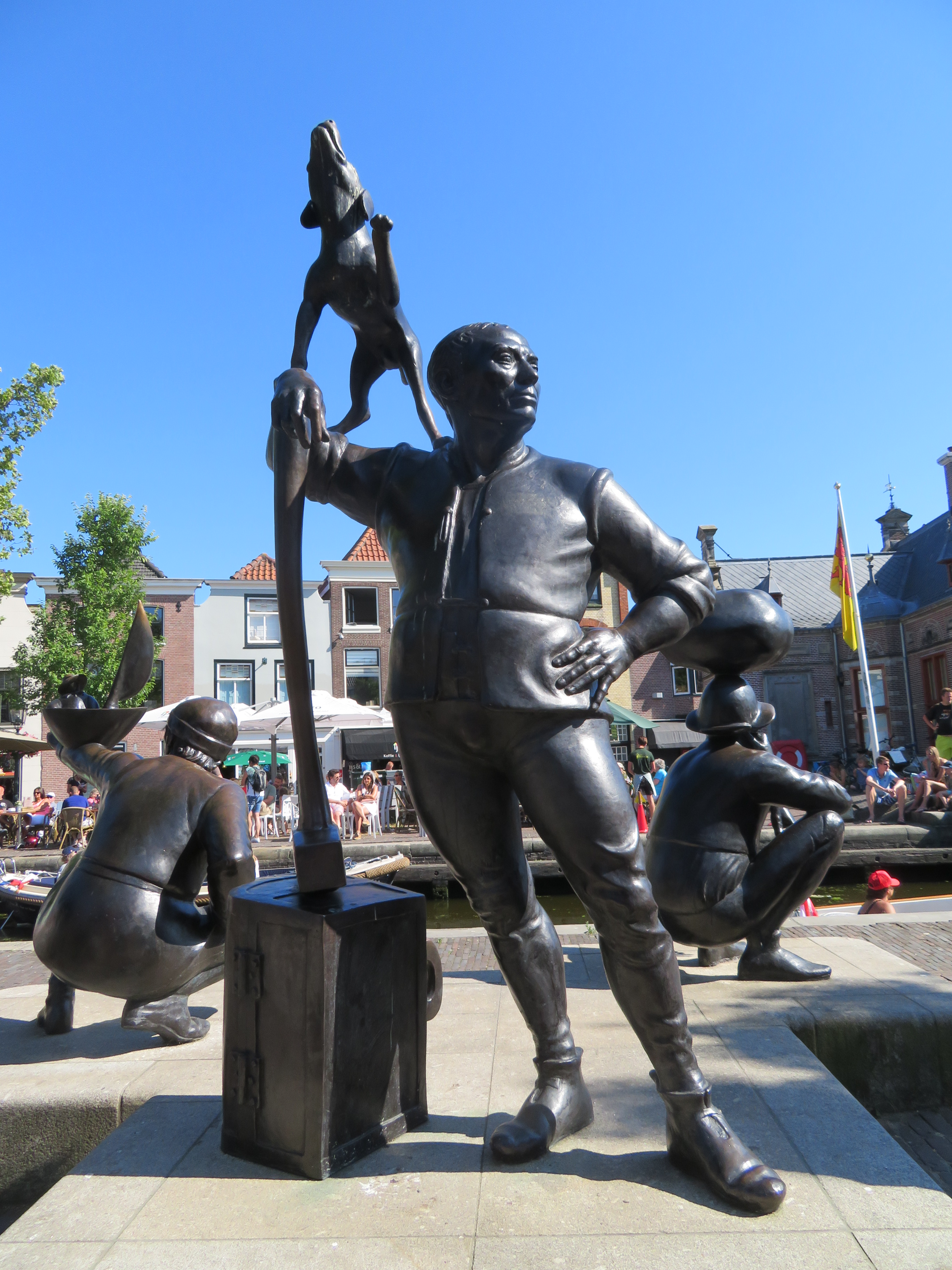 Kunstwerk Damwachters van Hans Kuyper in Leidschendam aan de Sluiskant. Brons, september 2013